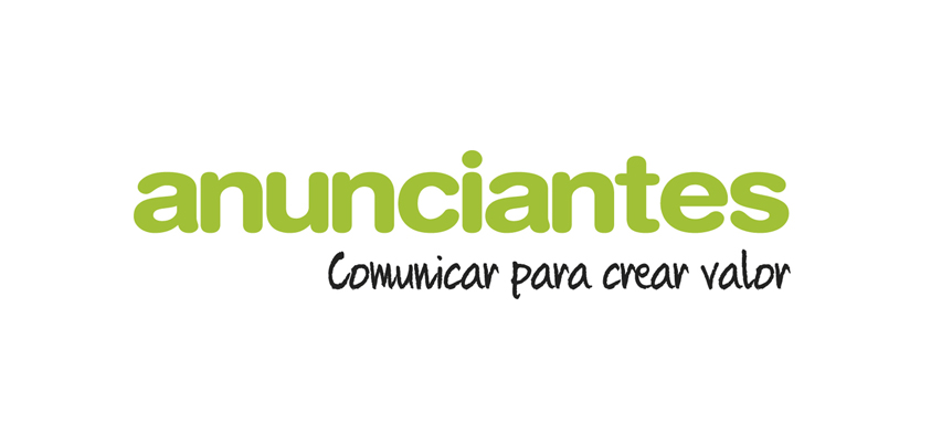 Logotipo de la Asociación Española de Anunciantes, con el lema "Comunicar para Crear Valor".